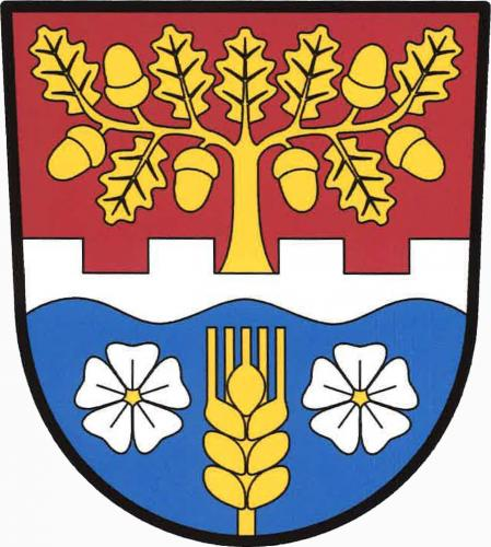 znak , Sukorady, okres Jičín